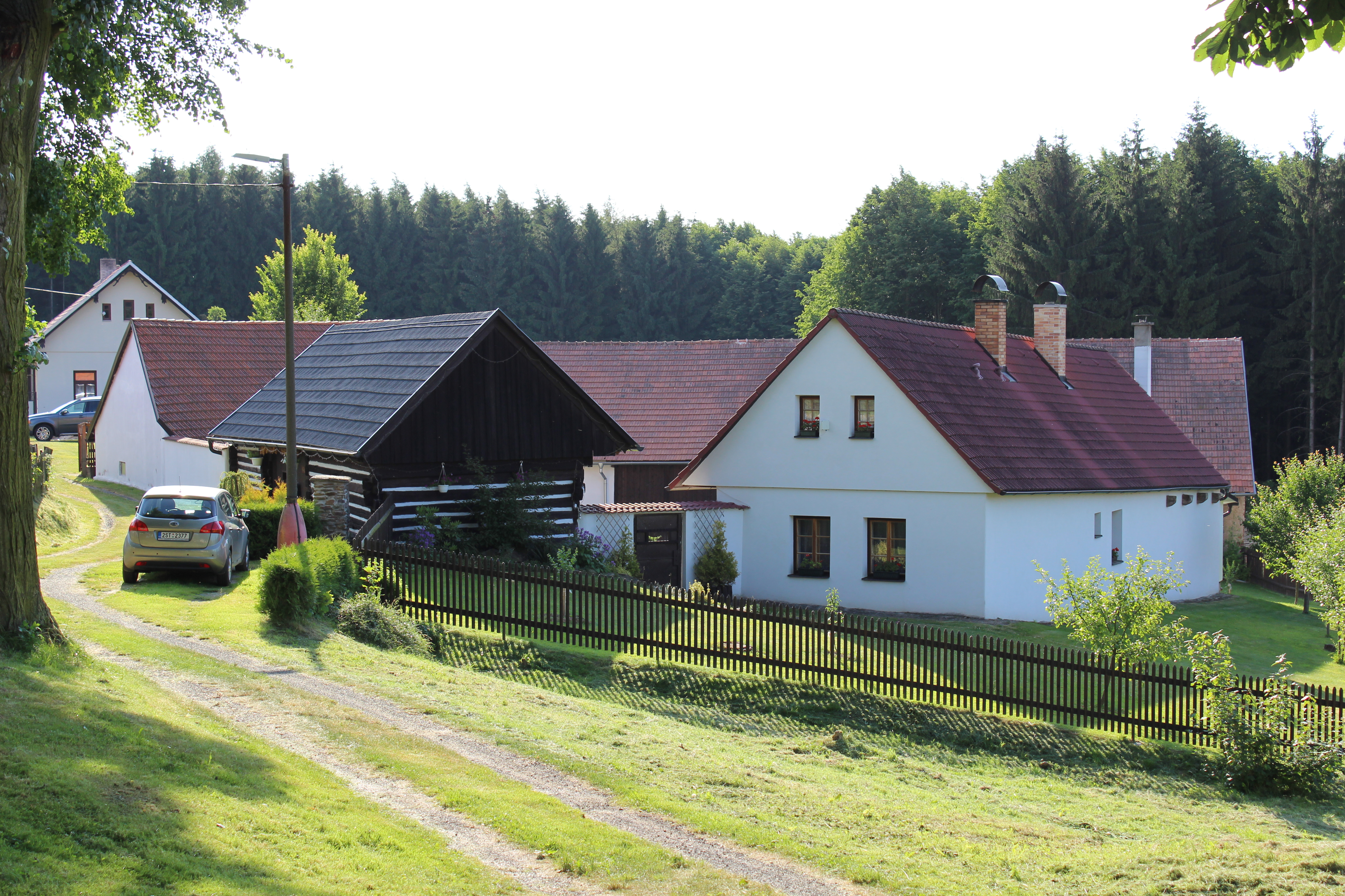 Dům číslo popisné 6 ve Stříteži, části Dolních Kralovic.